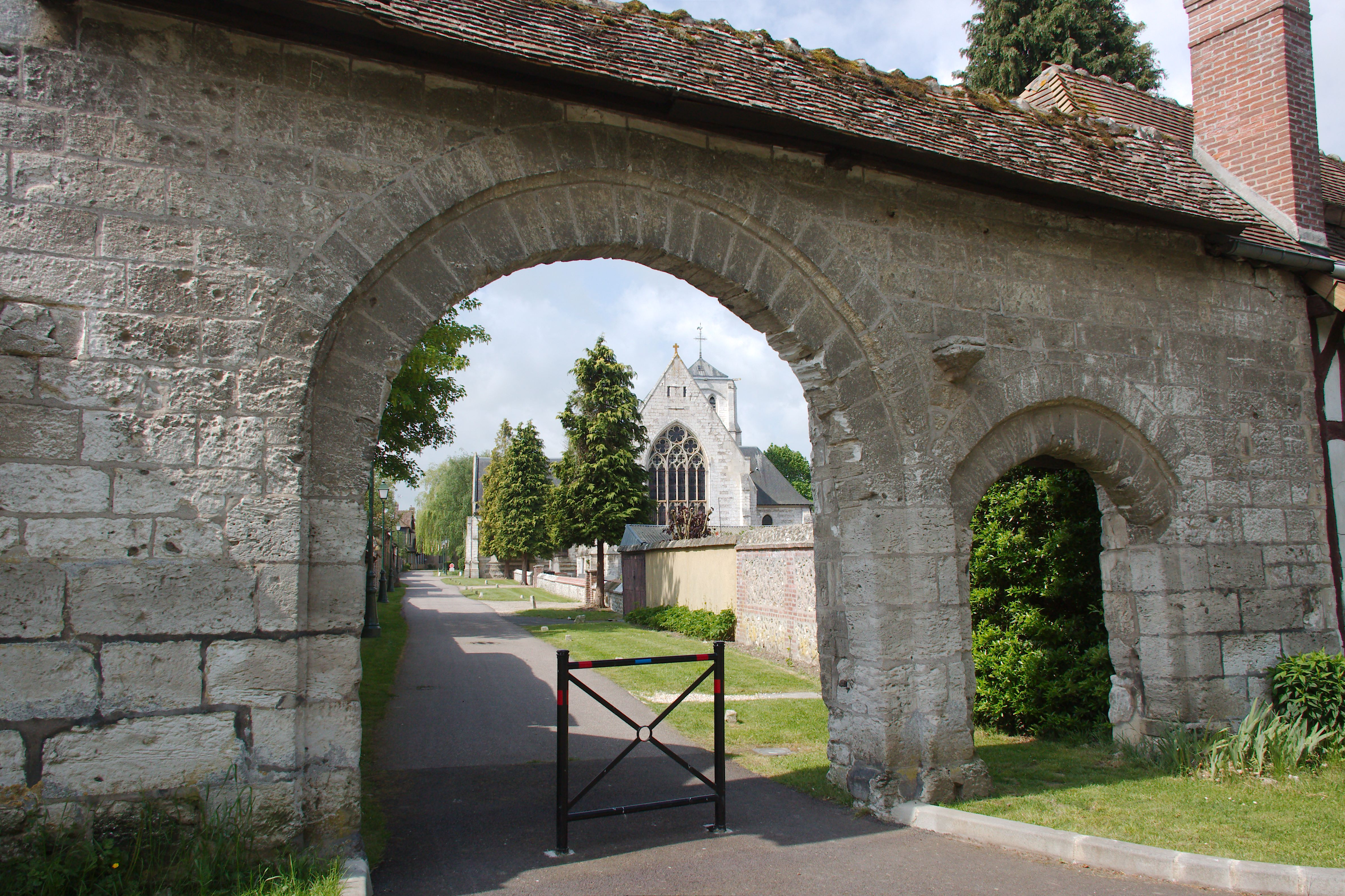 La Saussaye : porte des Chanoines et collégiale Saint-Louis